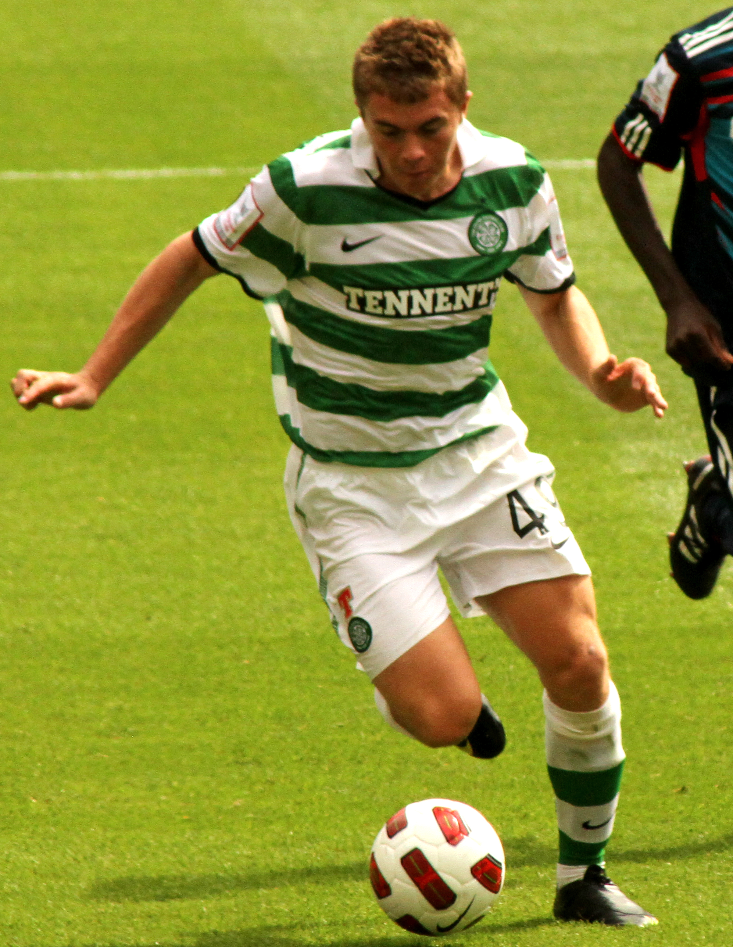 James Forrest & Samuel Umtiti